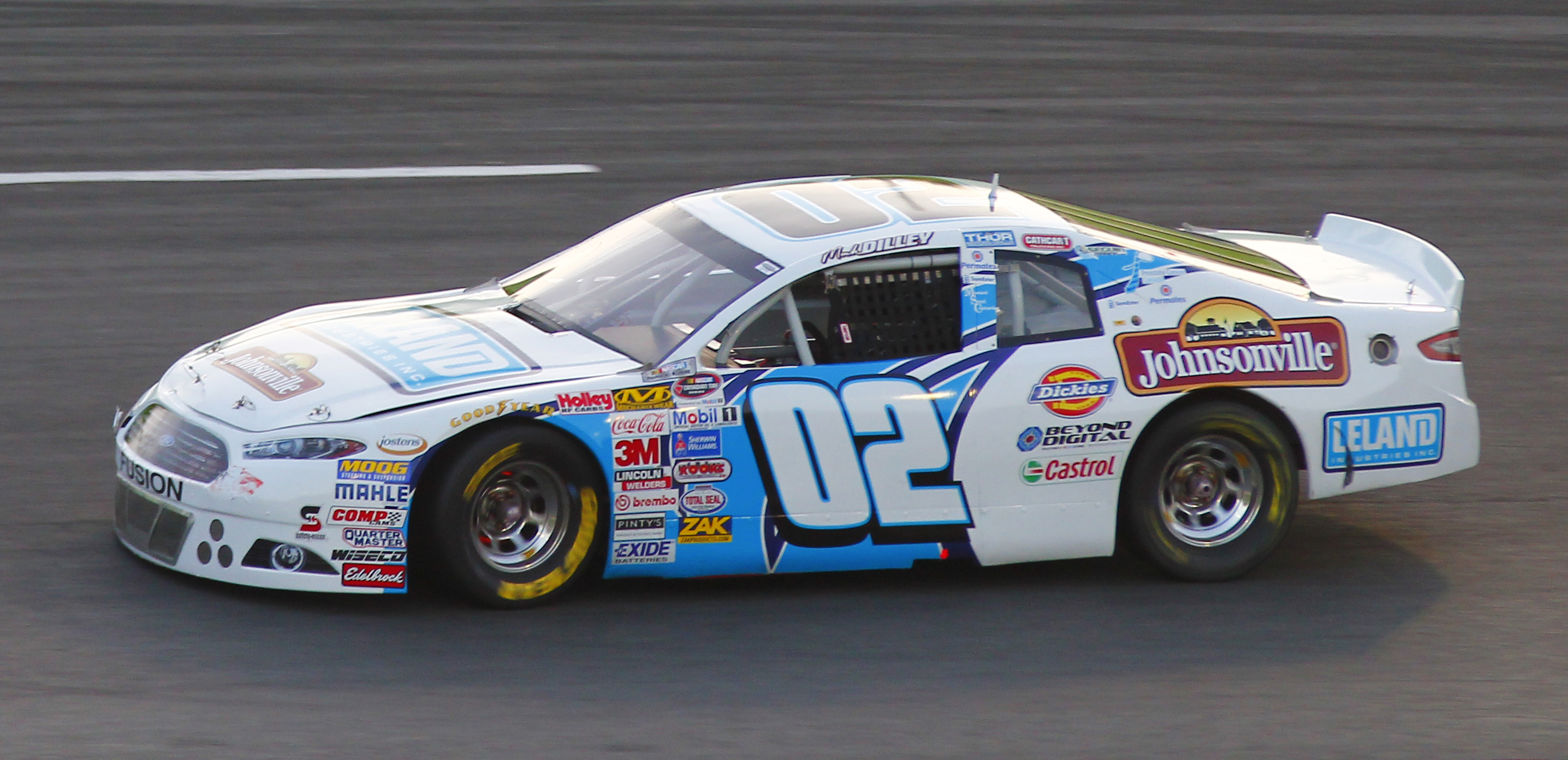 Mark Dilley - Nascar Canadian Tire Series - Autodrome Chaudière - 13 juin 2015 (photo Paul-Émile Poulin-Jacques)